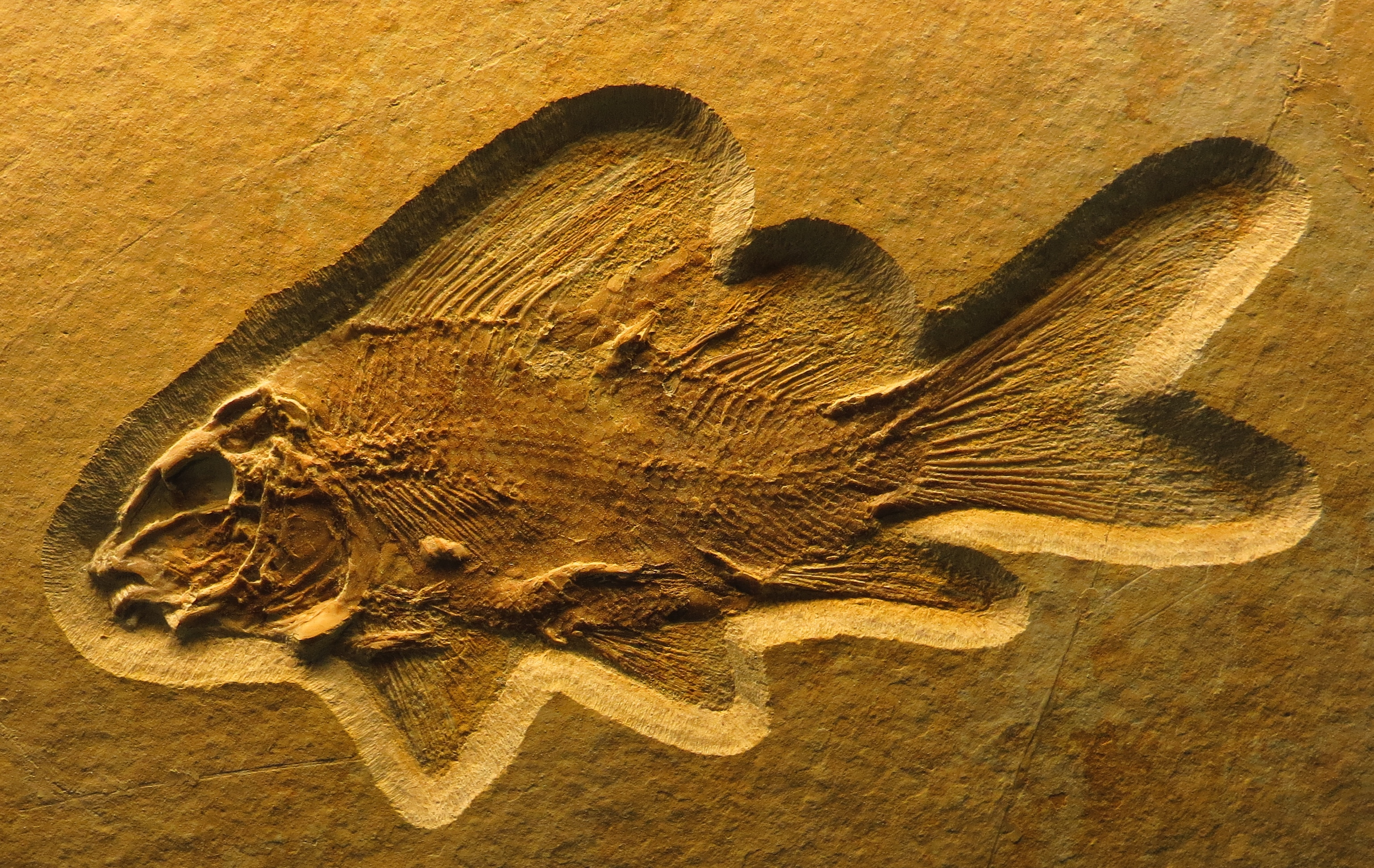 Took the picture at Burgmeister Muller Museum, Solnhofen